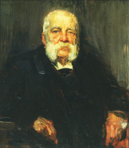 Bildnis Ludwig Hartmann